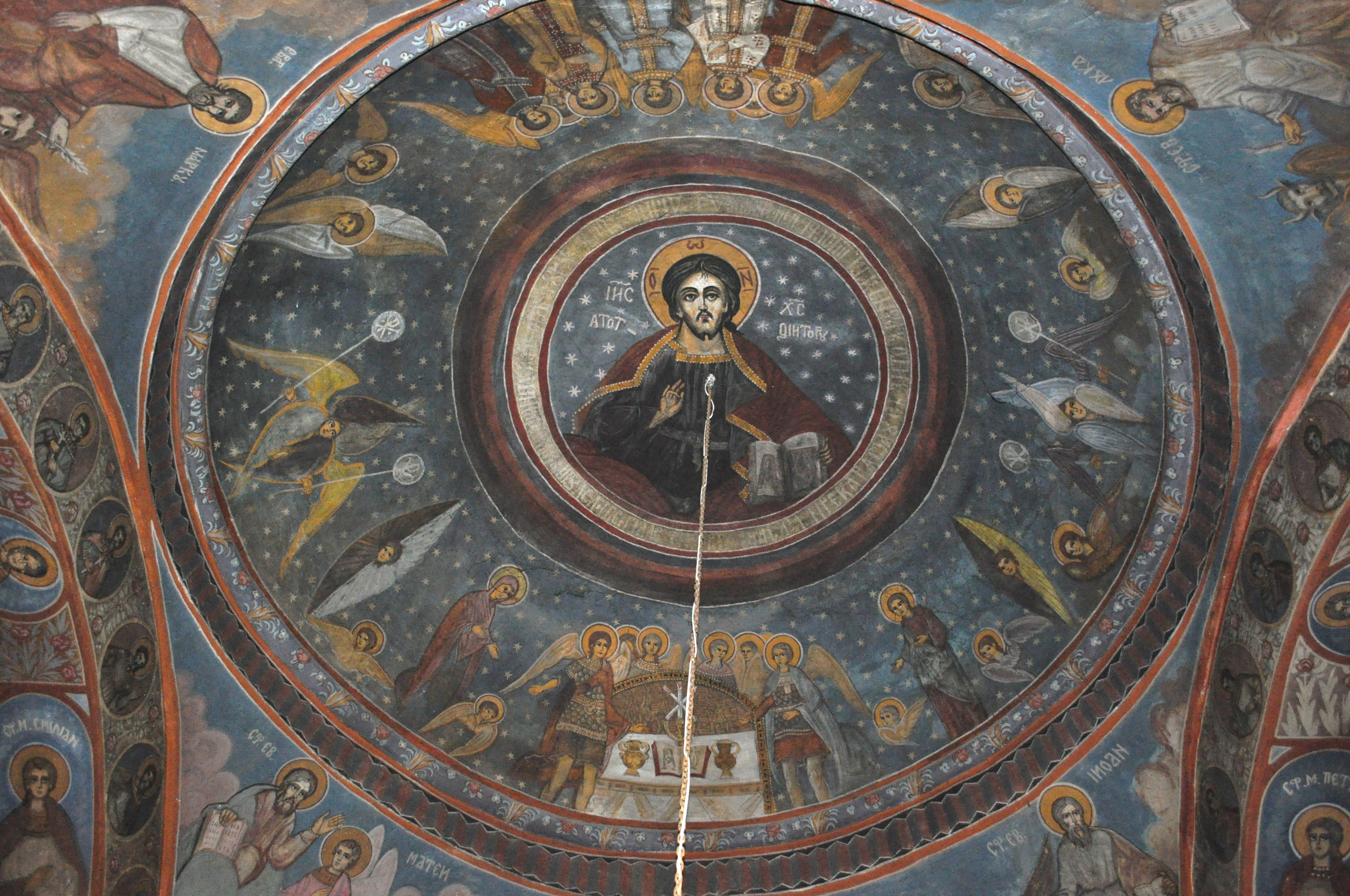 Biserica "Intrarea în Biserică"-Brad-Bătușari, municipiul Curtea de Argeș, Str. Vlaicu Vodă 8